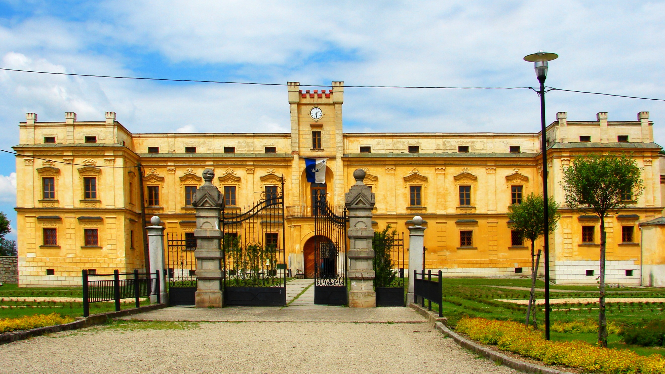 Zámek Slezské Rudoltice, Slezské Rudoltice 1